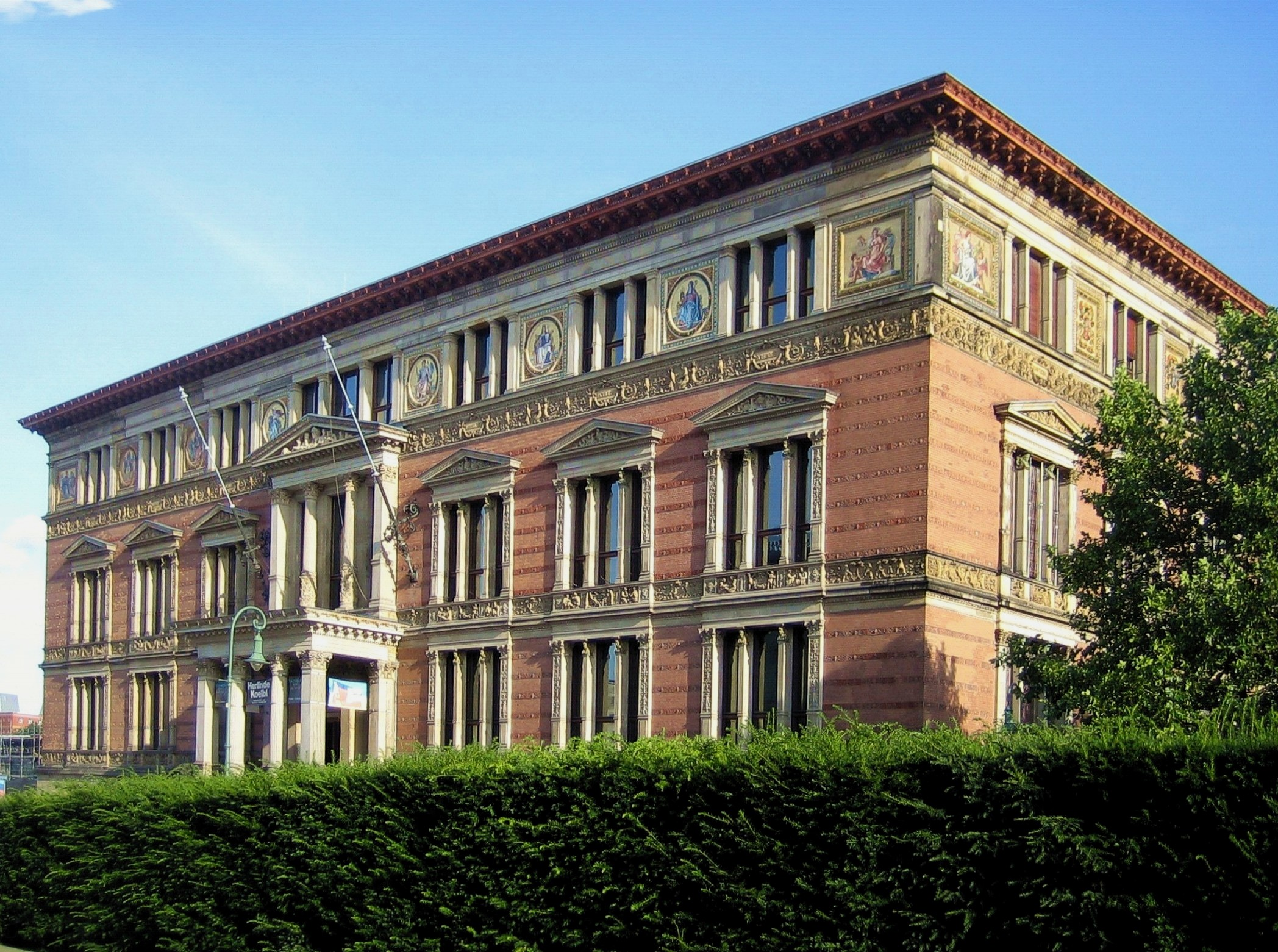 Der Martin-Gropius-Bau in Berlin Kreuzberg, Niederkirchnerstraße. Ehemaliges Kunstgewerbemuseum, heute als Ausstellungsgebäude genutzt. Gesamtansicht.